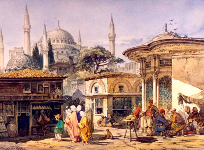 Street in Constantinopel